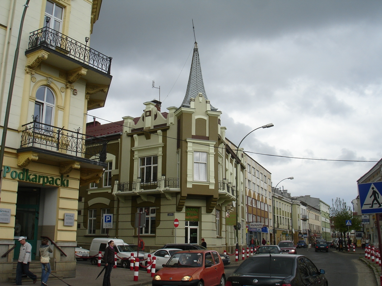 Sanok - Kościuszko street